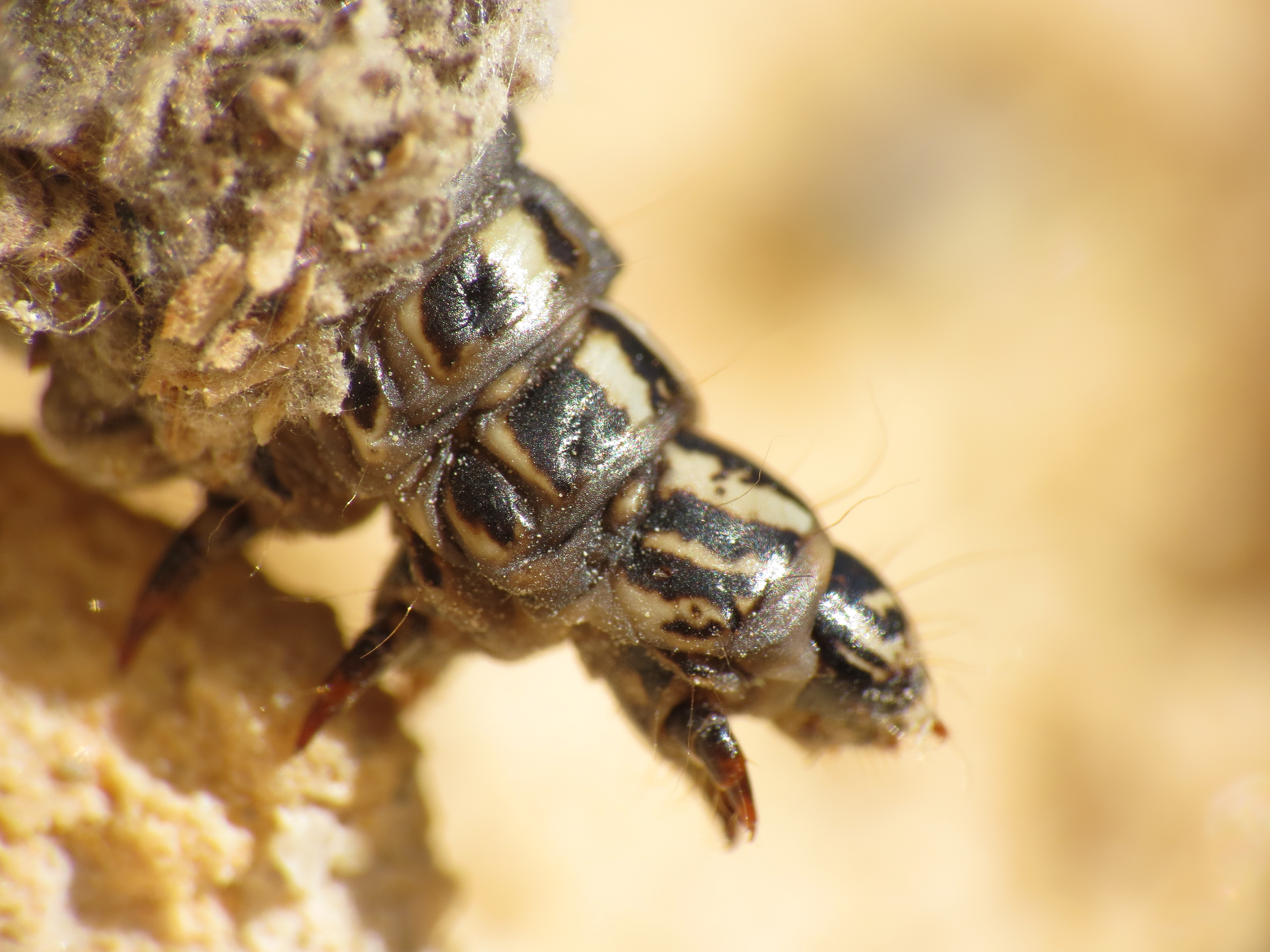 Canephora hirsuta (Poda, 1761), larva in case, Pont del Diablo, Tarragona, Spain, 19 May 2013